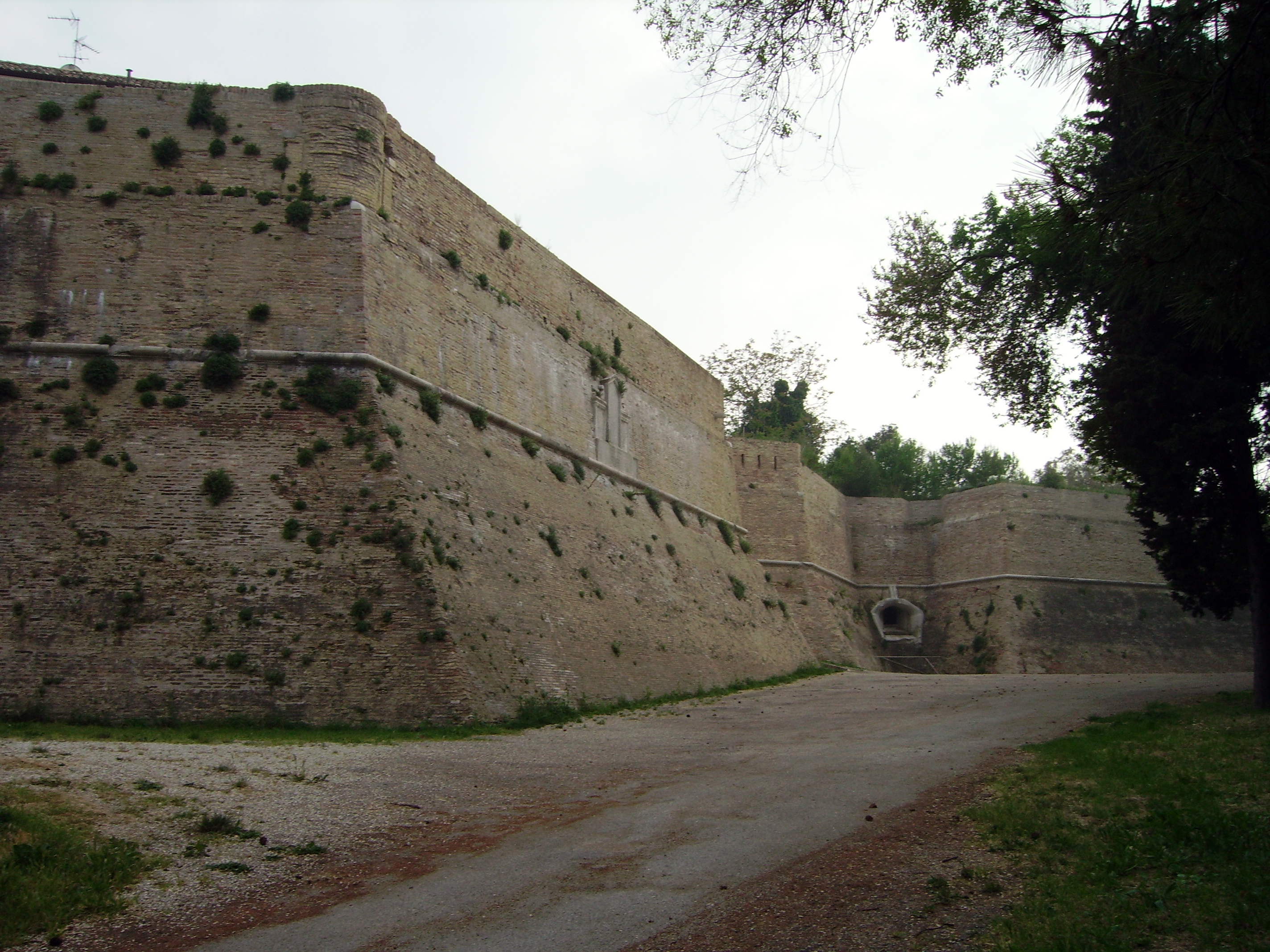 Mura esterne della Cittadella di Ancona.